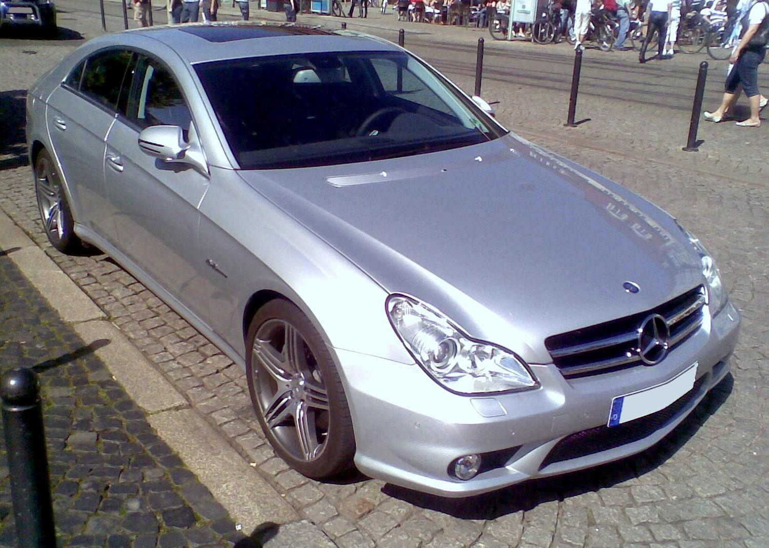 Mercedes-Benz CLS 63 AMG